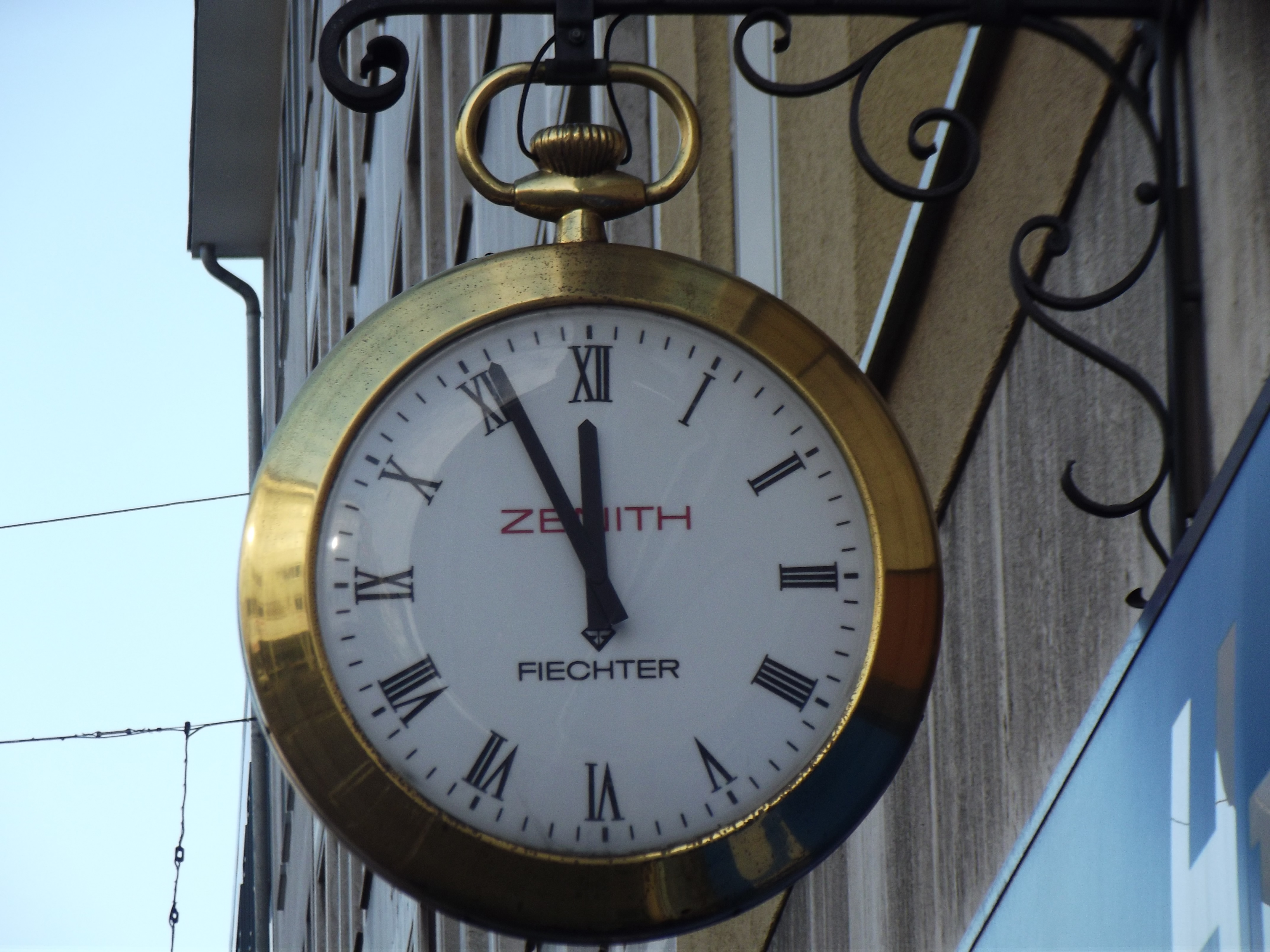 Große Taschenuhr als Laden- und Werkstattschild.